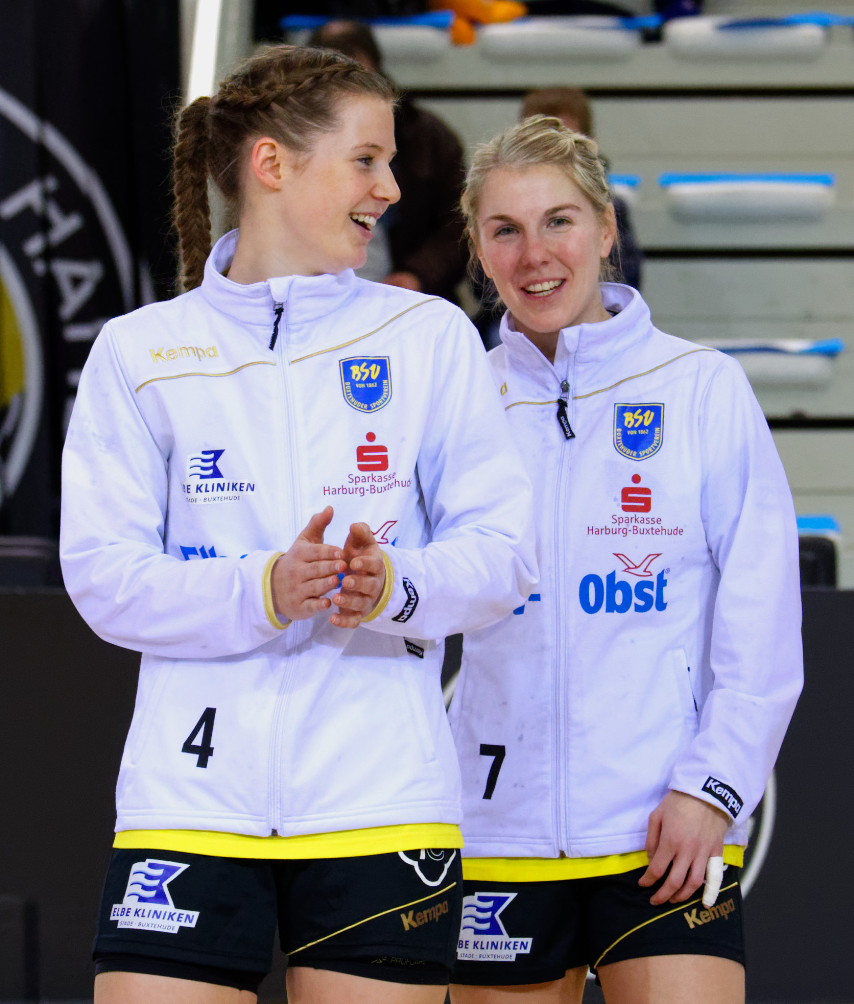 Rencontre du 3e tour de la Coupe des Vainqueurs de Coupe. A Issy Les Moulineaux, le 22 novembre 2015.